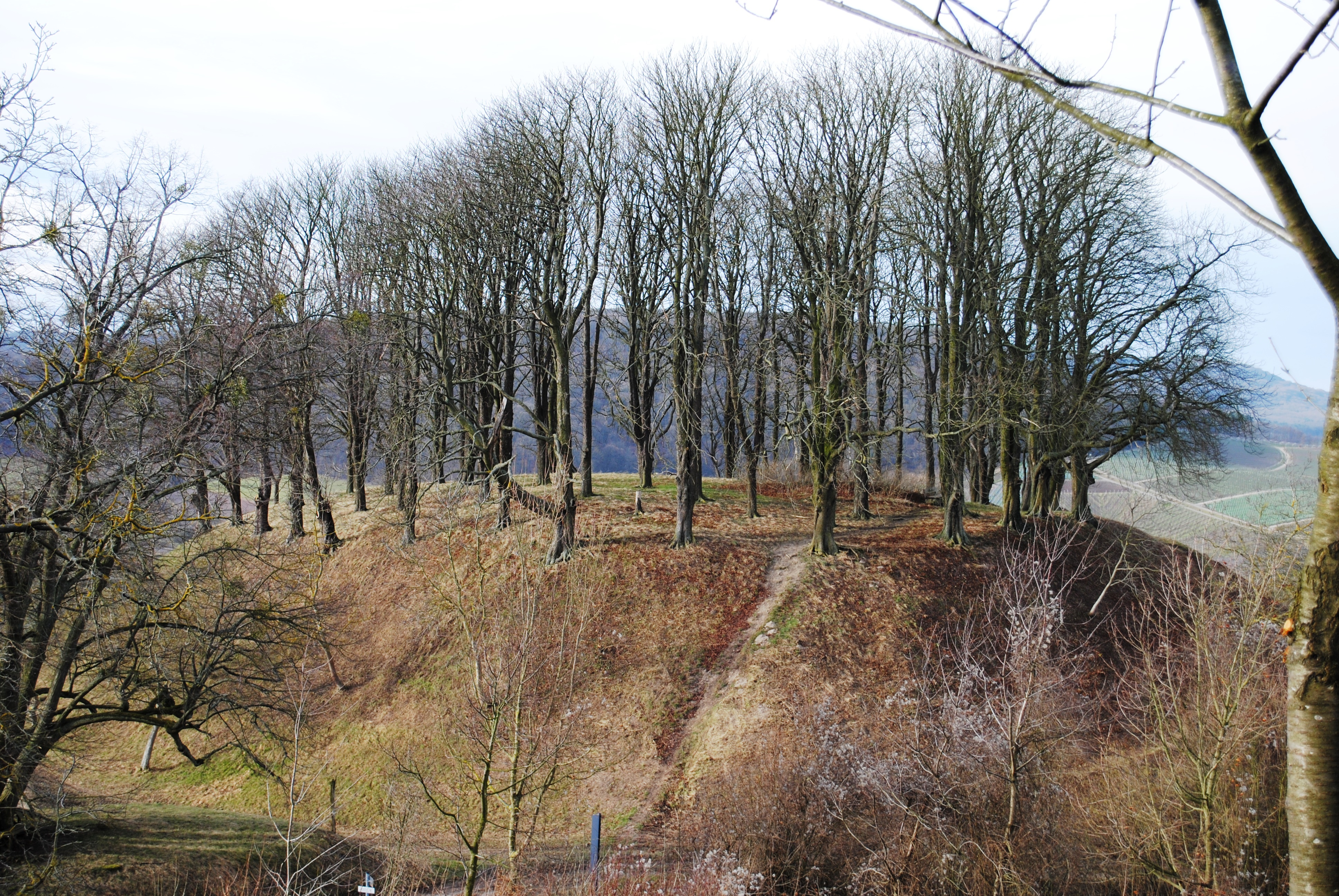 Turmhügel Altcastell, Castell